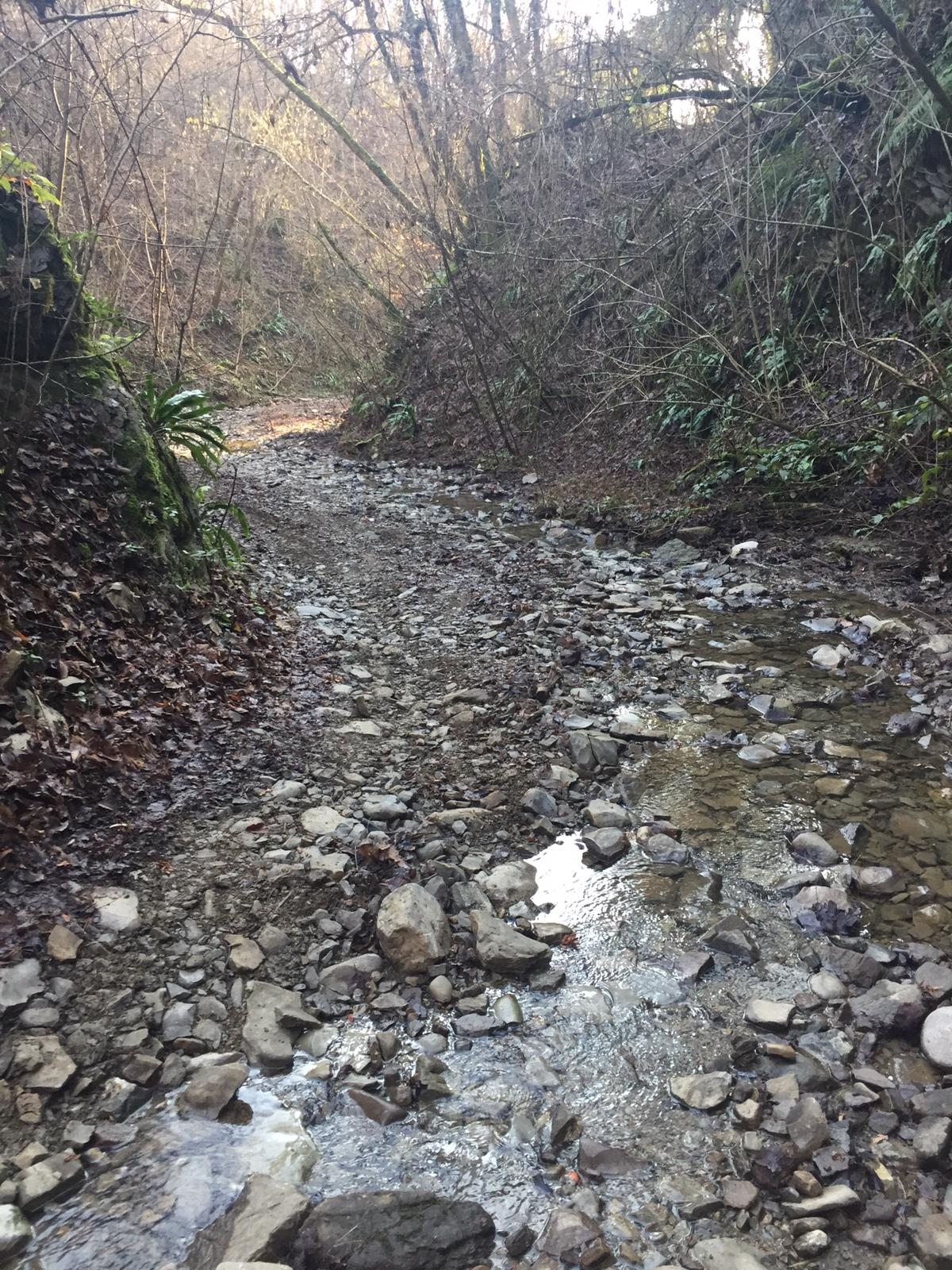 Accesso al sito dal greto del Rio Motta